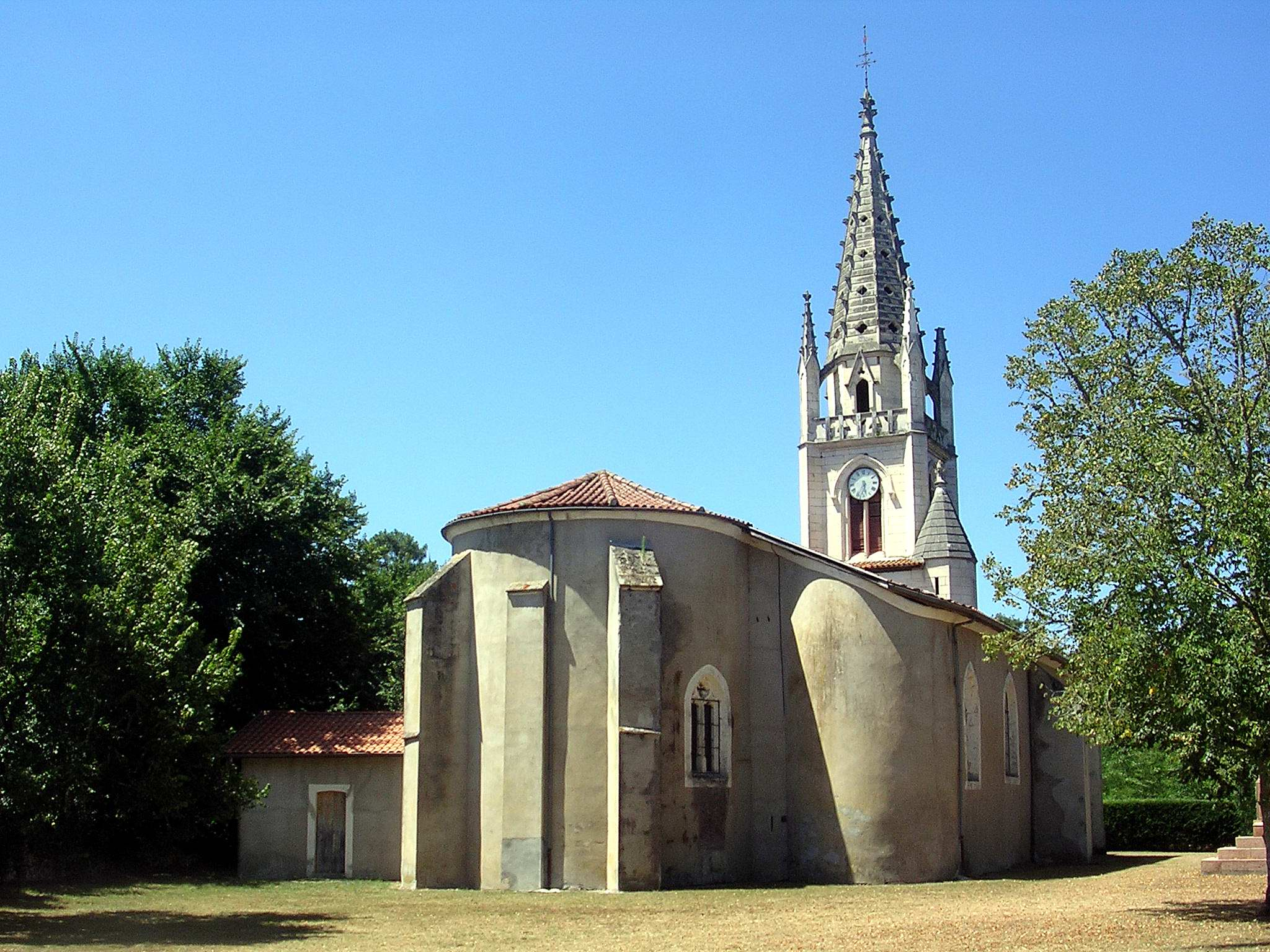 église de Lüe, dans le département français des Landes.